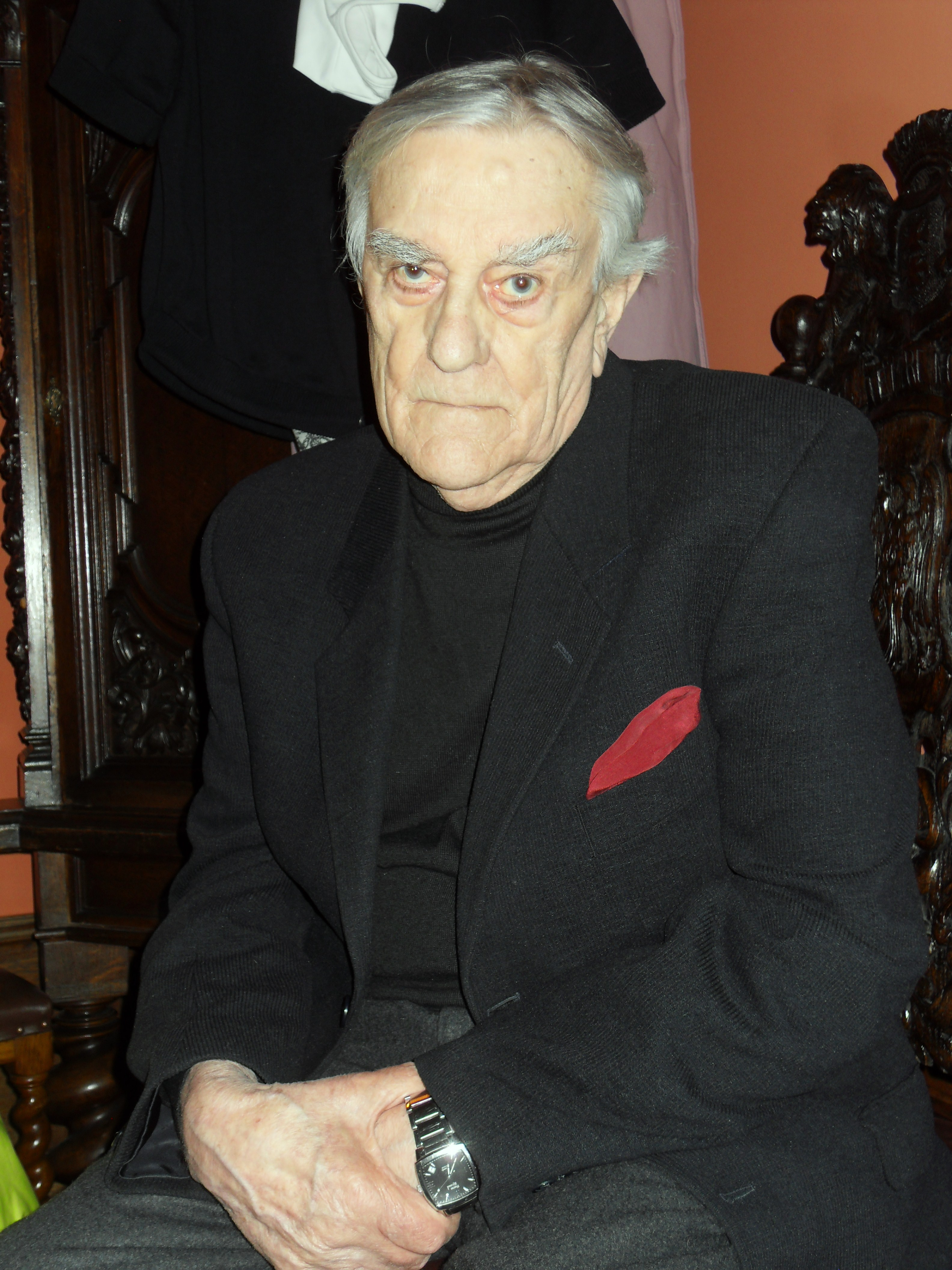 Ryszard Ronczewski, trójmiejski aktor.